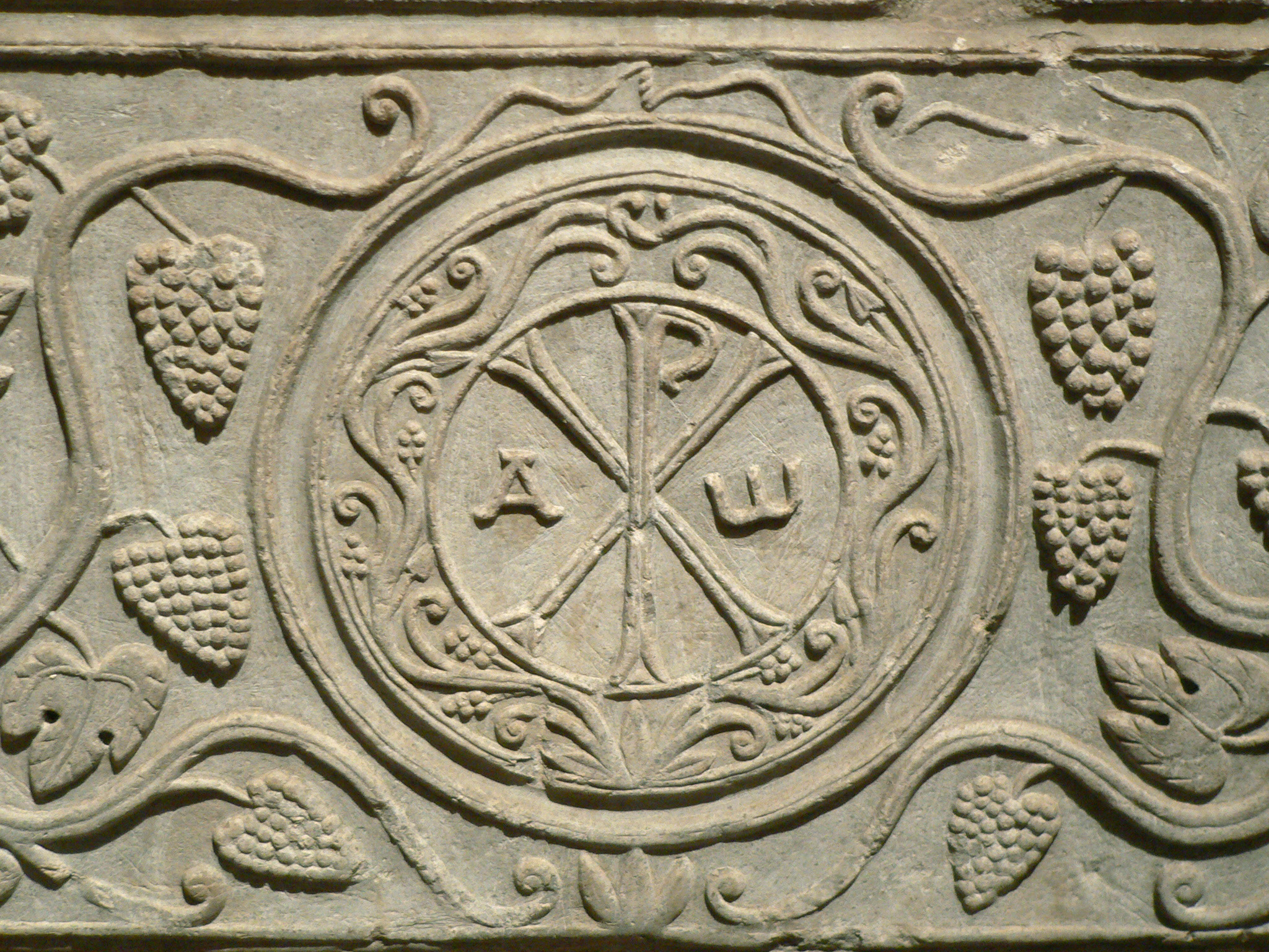 Sarcophage de Drausin, détail Cuve de sarcophage VI° siècle Marbre Provenance : Soissons L.: 2,12 m, l.: 0,76 m, H.: 0,53 m Décoré d'un chrisme et de pampres de vigne. Il aurait, selon la tradition, contenu le corps de Drausin ,évêque de Soissons, mort v. 680 Ma 2955 Musée du Louvre, Denon, Rez-de-Chaussée, salle 28. Photographe: Clio20